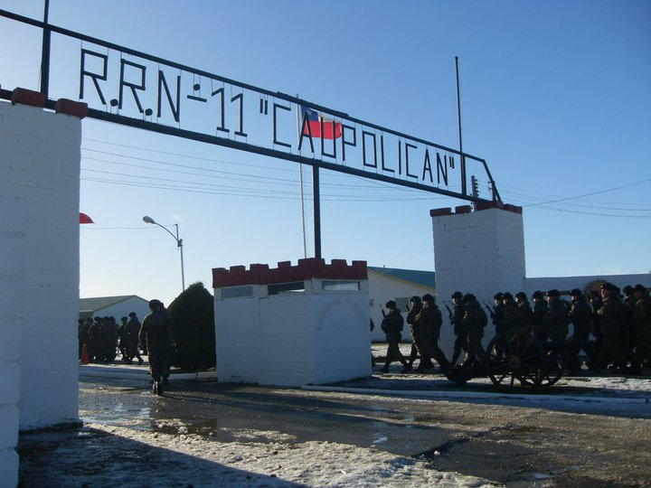 Entrada principal de RR n.º11 Caupolicán. Porvenir, Isla Grande de Tierra del Fuego. Chile.